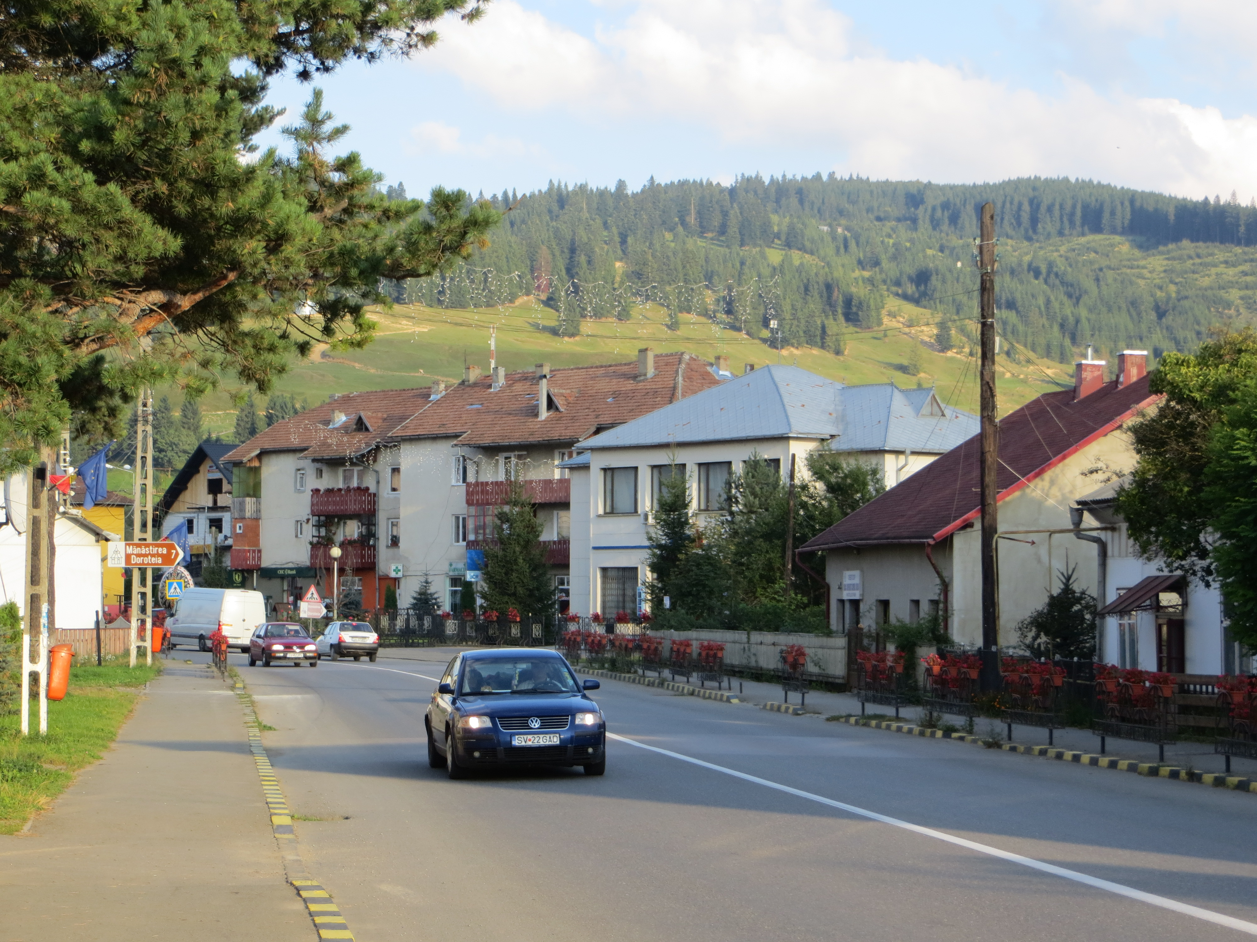 Centrul orașului Frasin, județul Suceava, România.